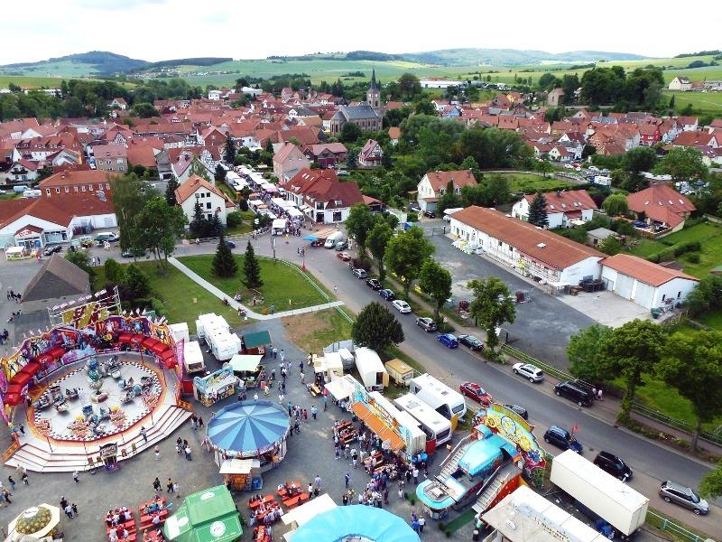 Das Bild zeigt den Blick aus dem Riesenrad während des Kaltennordheimer Heiratsmarktes. Im Vordergrund sieht man den Festplatz "In der Aue" und im Hintergrund die Innenstadt von Kaltennordheim.